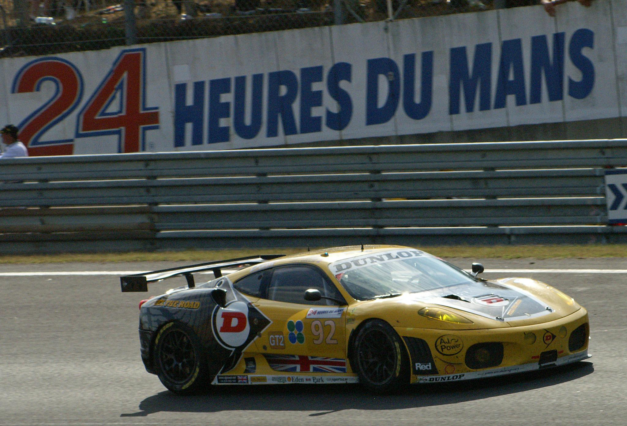 La Ferrari F430 GTC du JMW Motorsport aux mains d'Andrew Kirkaldy lors des 24 Heures du Mans 2009.